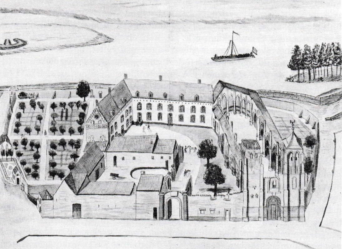 Pentekening door Philiipe van Gulpen van het leegstaande Antonietenklooster in Maastricht in 1844, gezien in vogelvlucht vanuit het westen. Op de achtergrond de Maas. De kerk was bij de Franse belegeringen van 1794 en 1794 zwaar beschadigd geraakt. Het complex werd gesloopt voor de aanleg van het Kanaal Luik-Maastricht in 1850. Collectie Gemeente Archief Maastricht, RHCL.